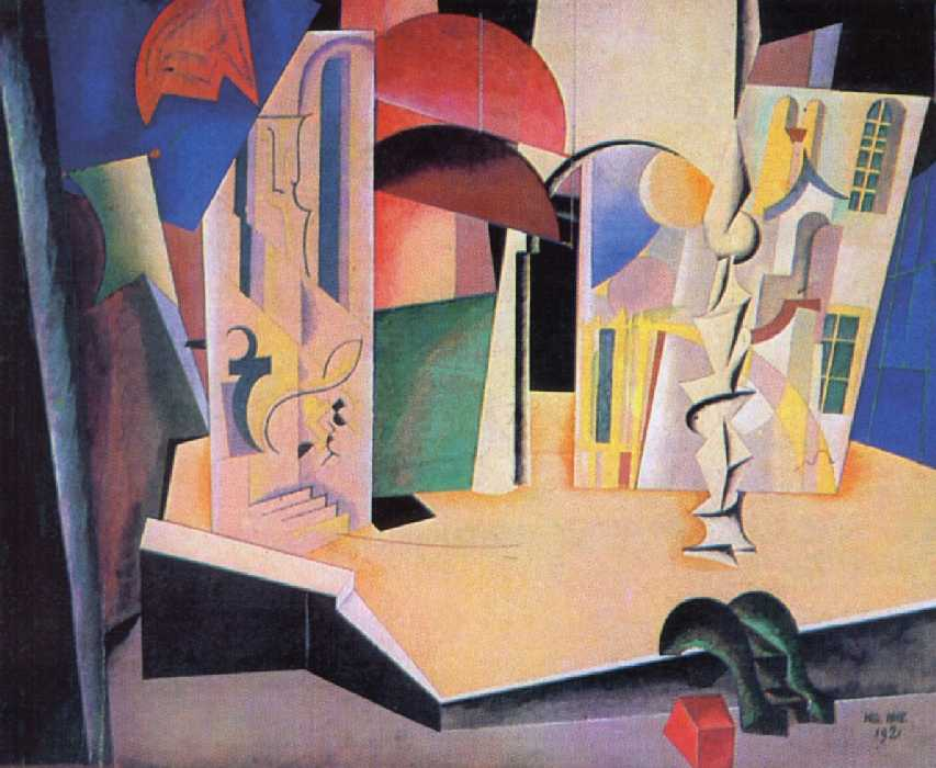 Нивинский Игнатий Игнатьевич. Эскиз декораций к сказке К. Гоцци «Принцесса Турандот». 1922г.